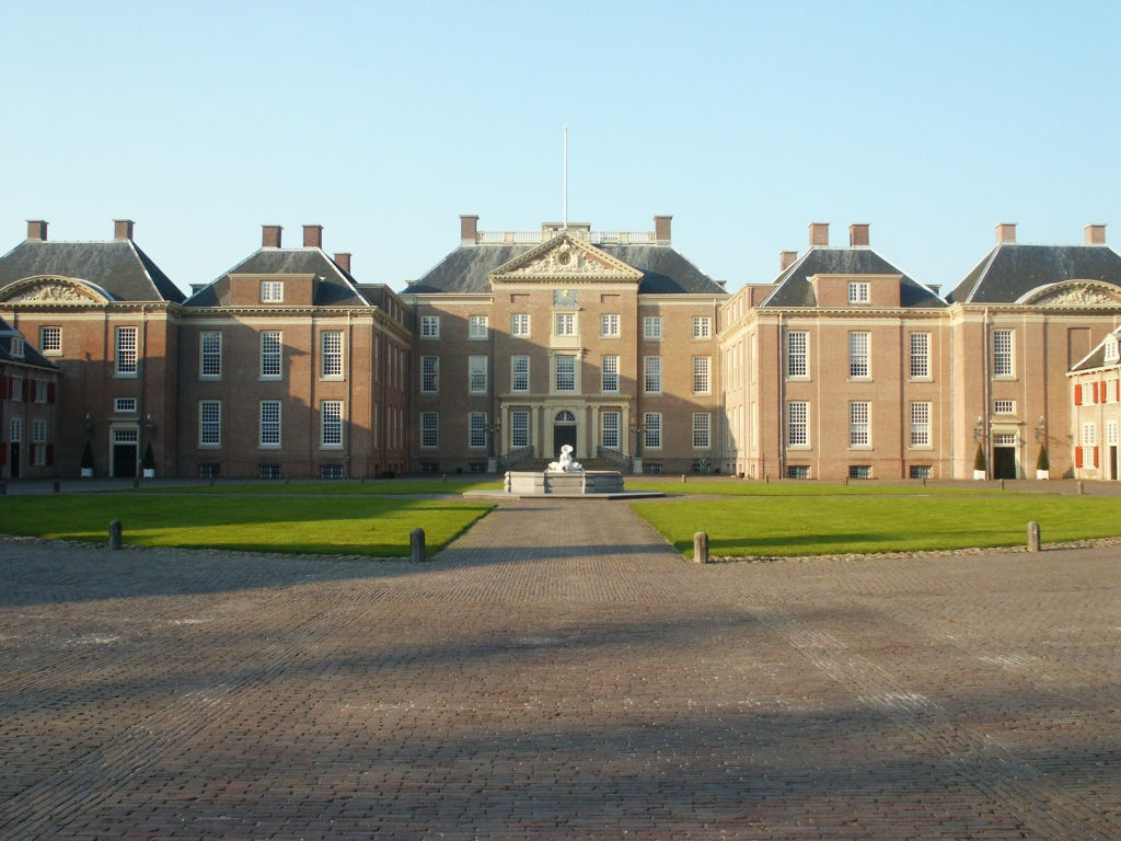 Paleis het Loo, Apeldoorn